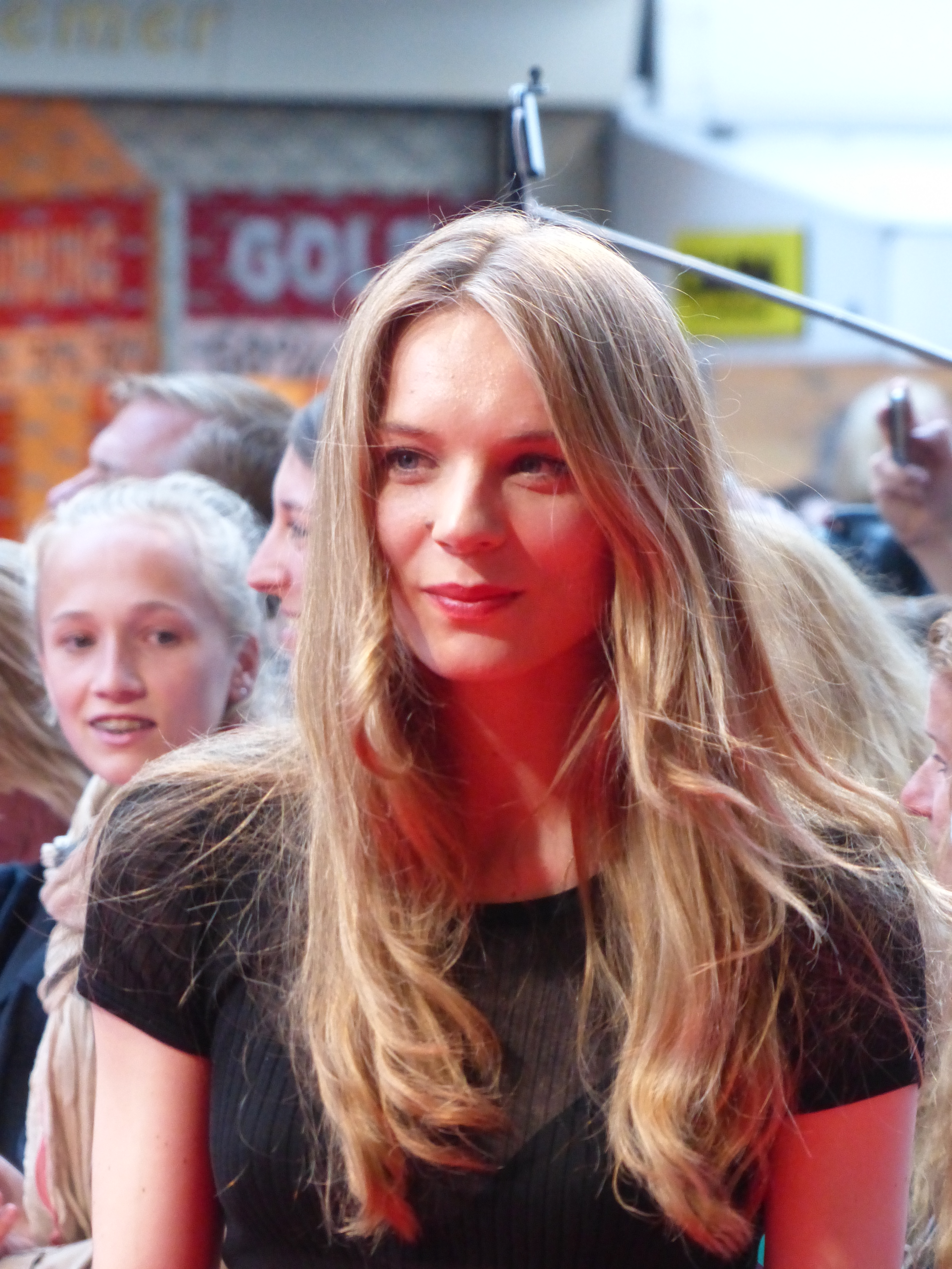 Deutschlandpremiere von "Die Lügen der Sieger - The Lies of the Victors" in der Lichtburg Essen am 08.06.2015.